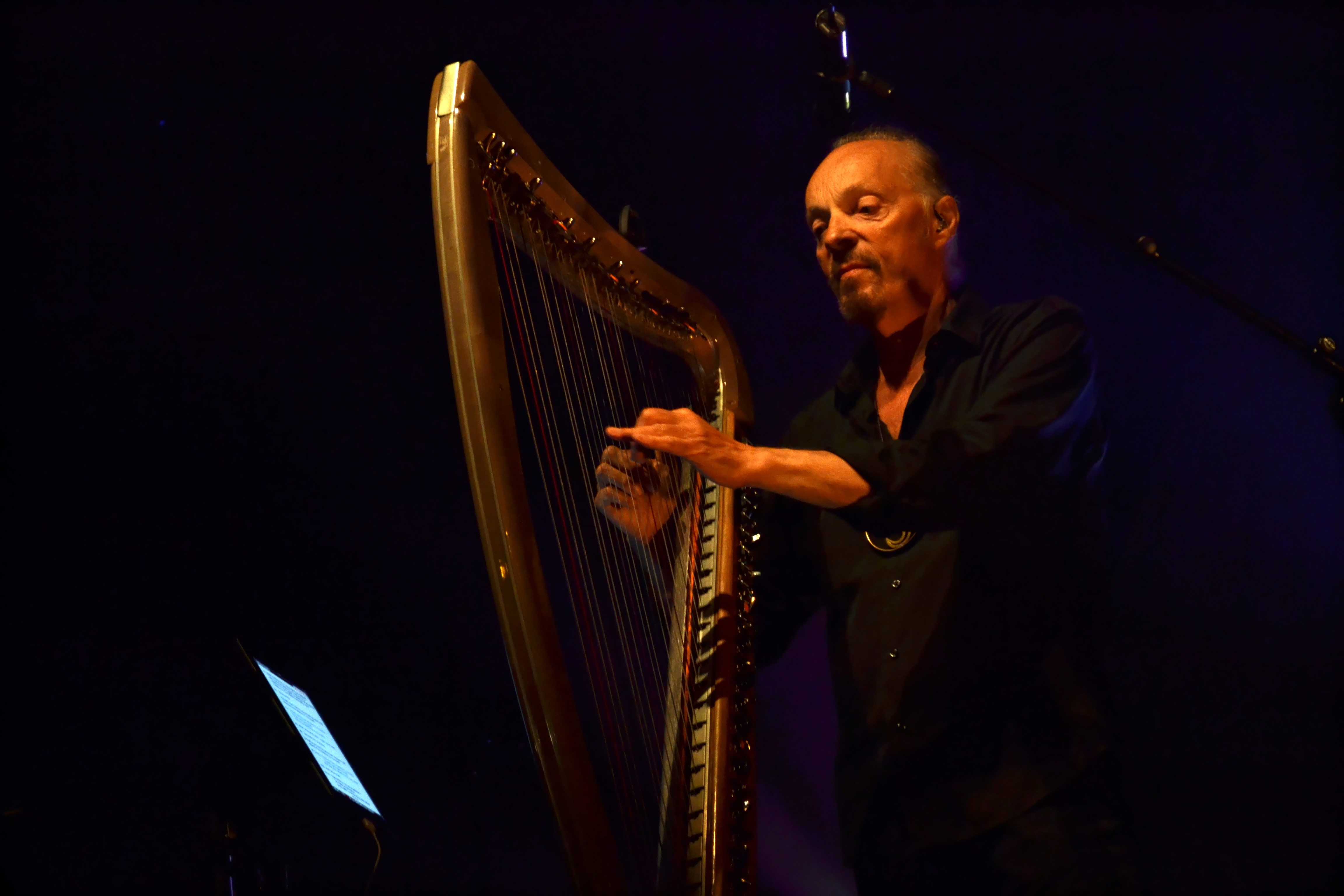 Alan Stivell en concert gratuit lors des Jeudis du port à Brest le 15 août 2013.